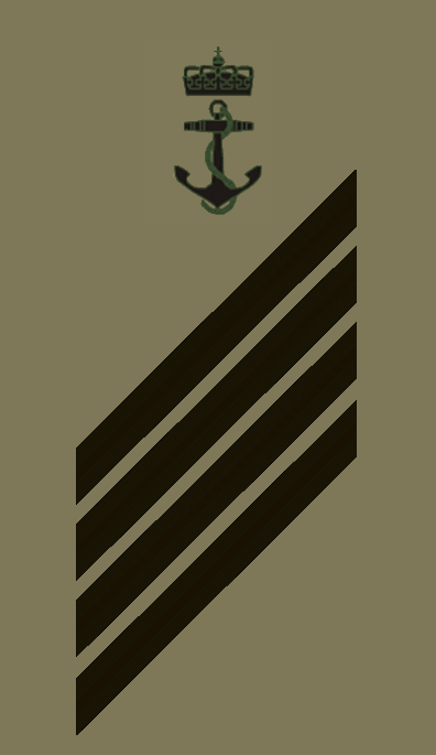 OR4 NOR - Seniorkonstabel NY